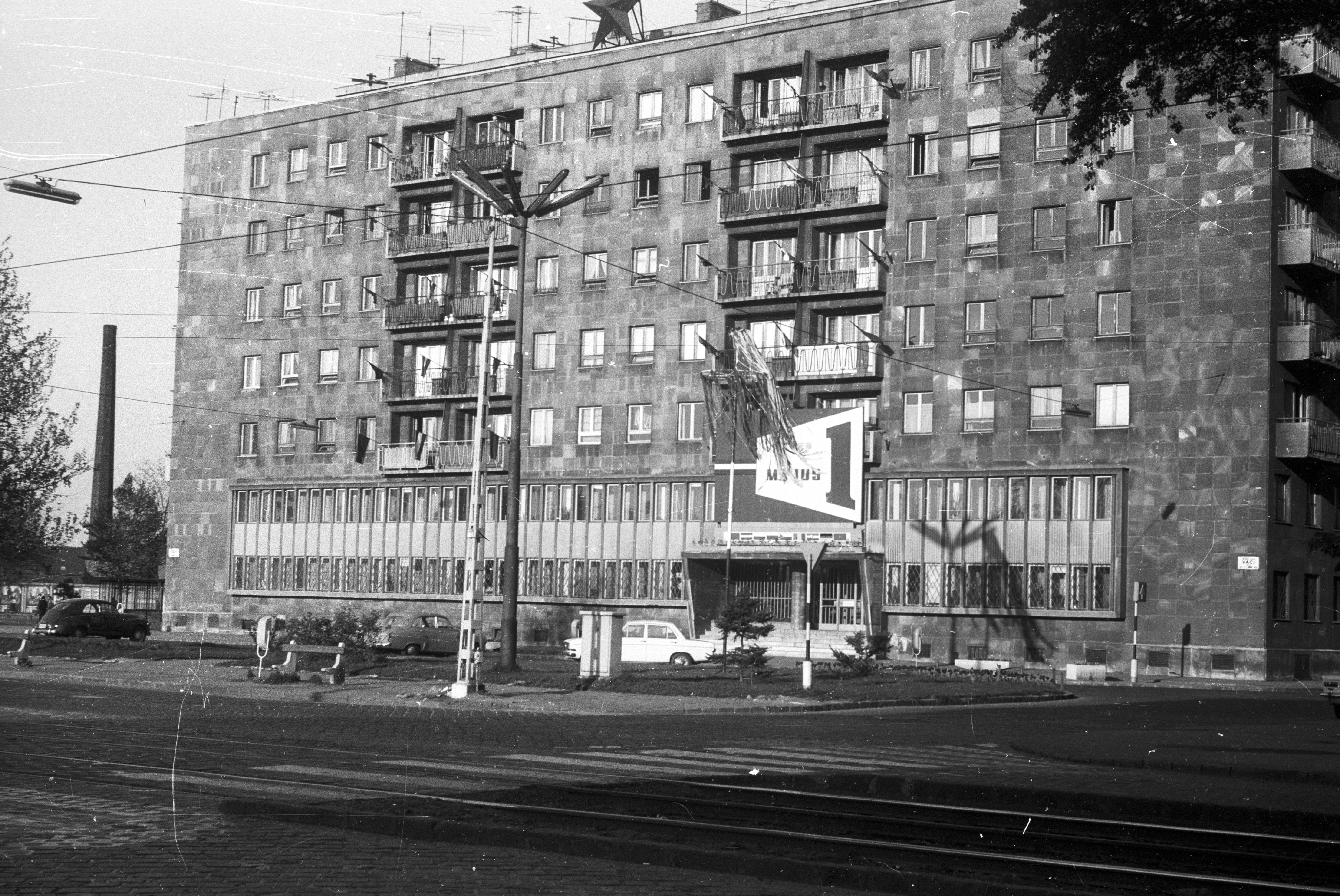 Váci út, lakóház a Róbert Károly körút sarkán, a József Attila Színház bejárata. Location: Hungary, Budapest XIII. Tags: political decoration, Red Star, Budapest Title: Váci út, lakóház a Róbert Károly körút sarkán, a József Attila Színház bejárata.